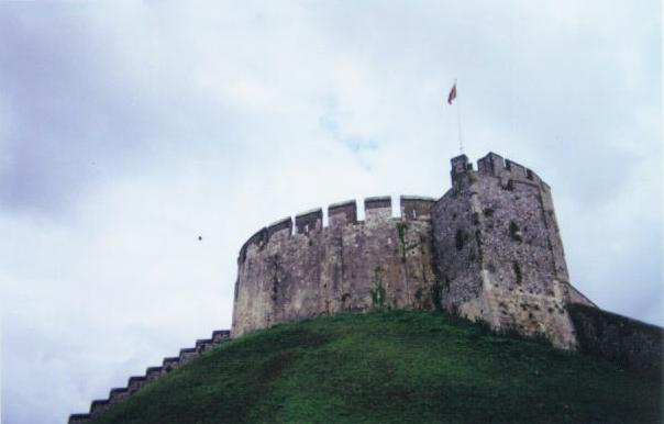 Arundel Castle Hill Fort